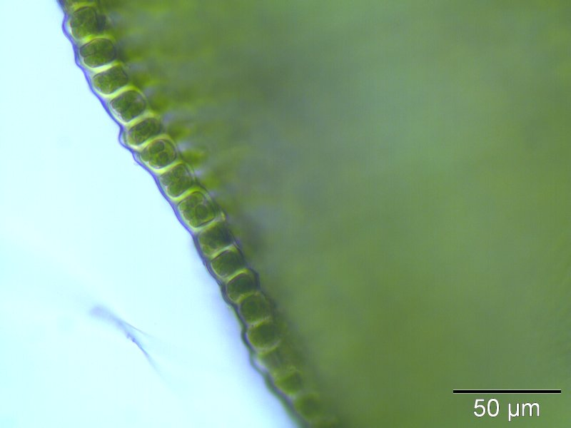 Streifensternmoos Aulacomnium androgynum, Blattrand, Vergrößerung: 400x, Rostock